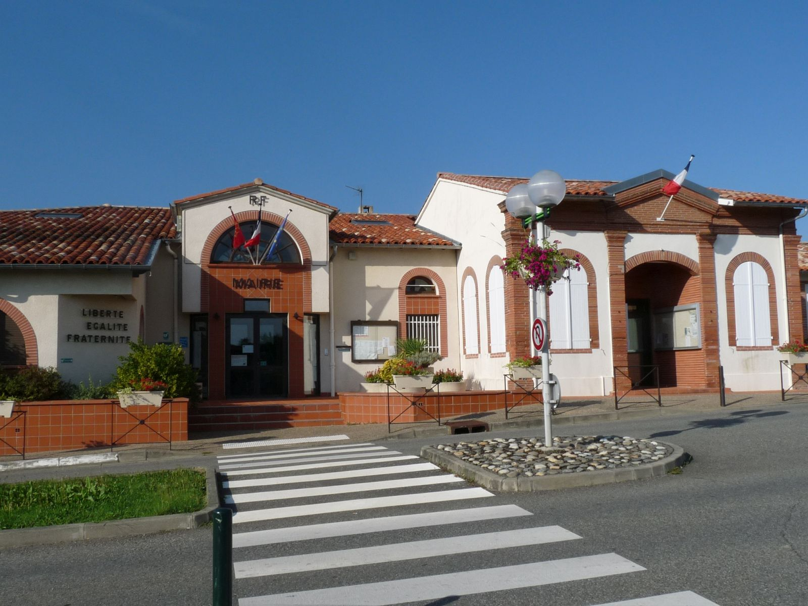 Mairie de Drémil-Lafage, Haute-Garonne, France